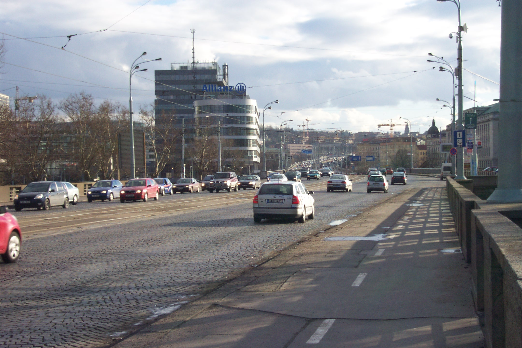 Hlávkův Most and higway in Prague - Hlávkův most a na něj navazující SJM